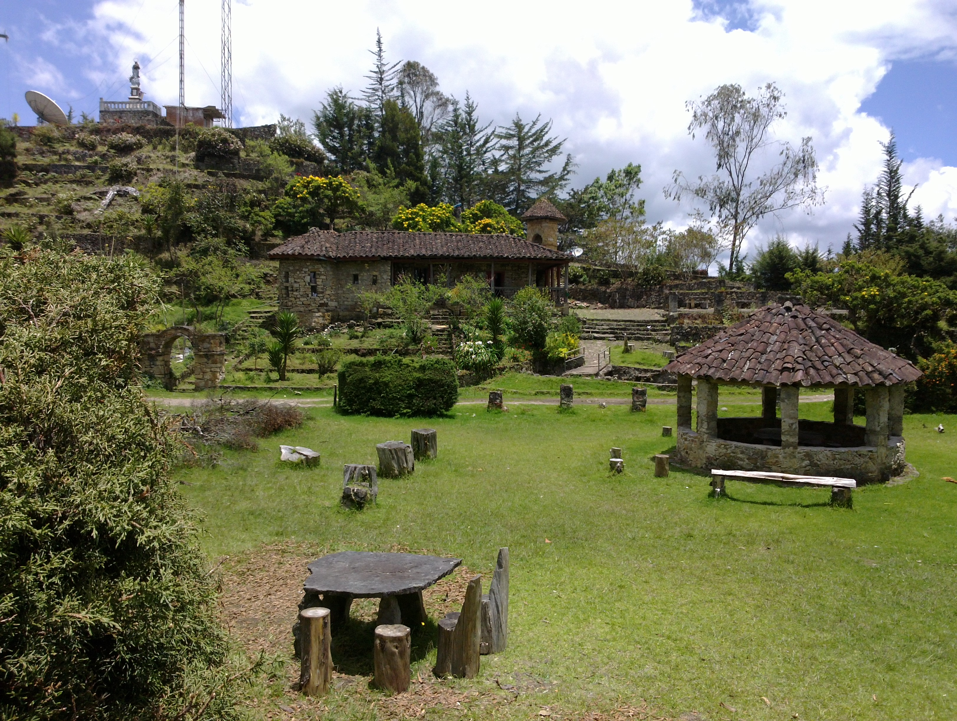 Ubicación: JUNIN, CUNDINAMARCA Parque Ararat ó Parque Alemania construcion realizada 1955 por Padre Luis Alejandro Jimenez Mallarino y la comunidad.